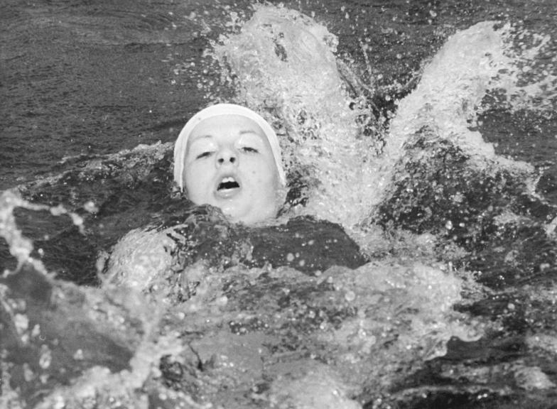 Evelyn Stoltze Zentralbild Liebers 10-7-70-Brandenburg: XXI. DDR-Meisterschaften im Sportschwimmen im neu eröffneten Volksbad von Brandenburg-Havel (3. Wettkampftag)-Mit der guten Zeit von 5:17,7min wurde Evelyn Stoltze (SC Dynamo Berlin) neue Meisteri im 400-m-Lagenschwimmen der Frauen.